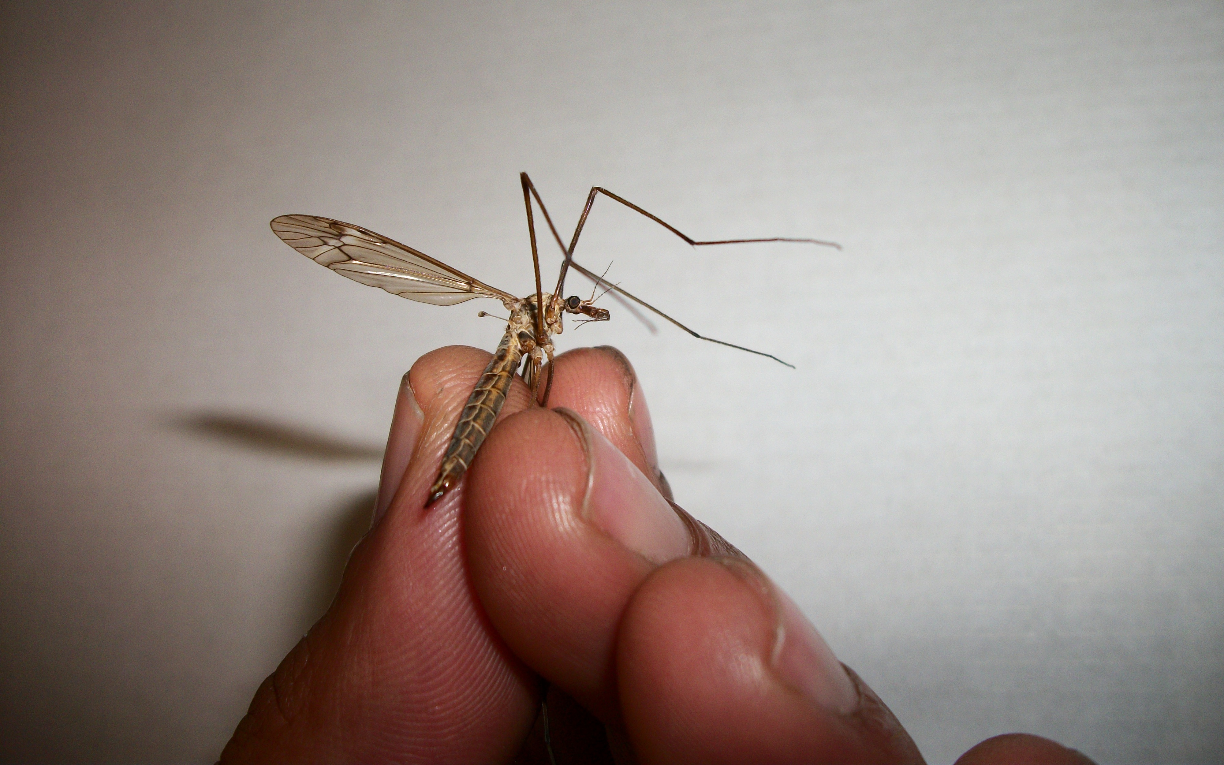 Se muestra una típula capturada en la mano para apreciar el tamaño proporcional.